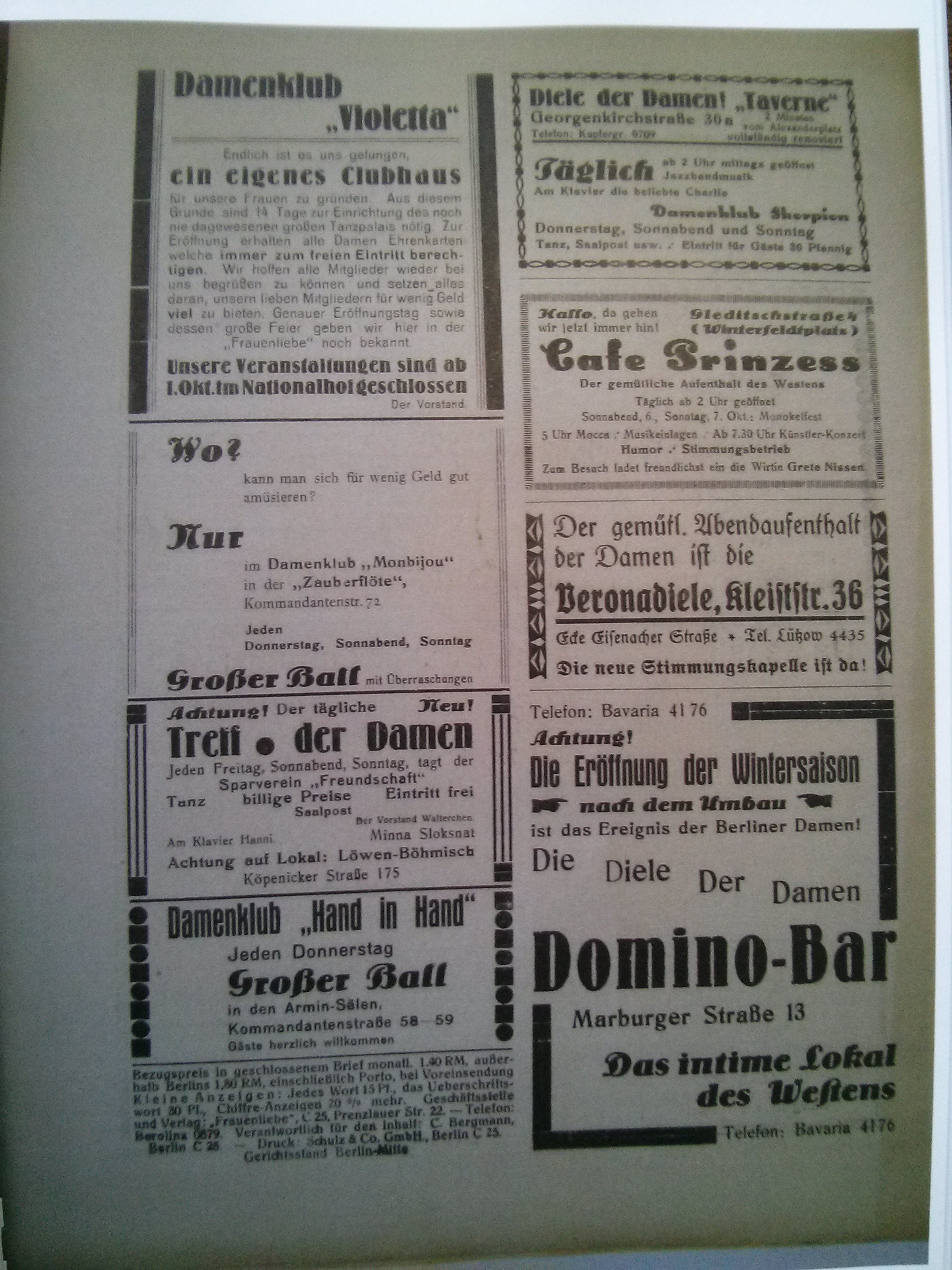 Aus der lesbischen Zeitschrift "Liebende Frauen", Berlin, 1928, Kleinanzeigenseite